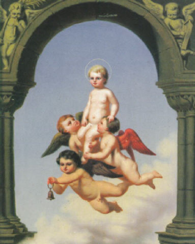 Unter einem Torbogen wird das Jesuskind von geflügelten Engeln getragen